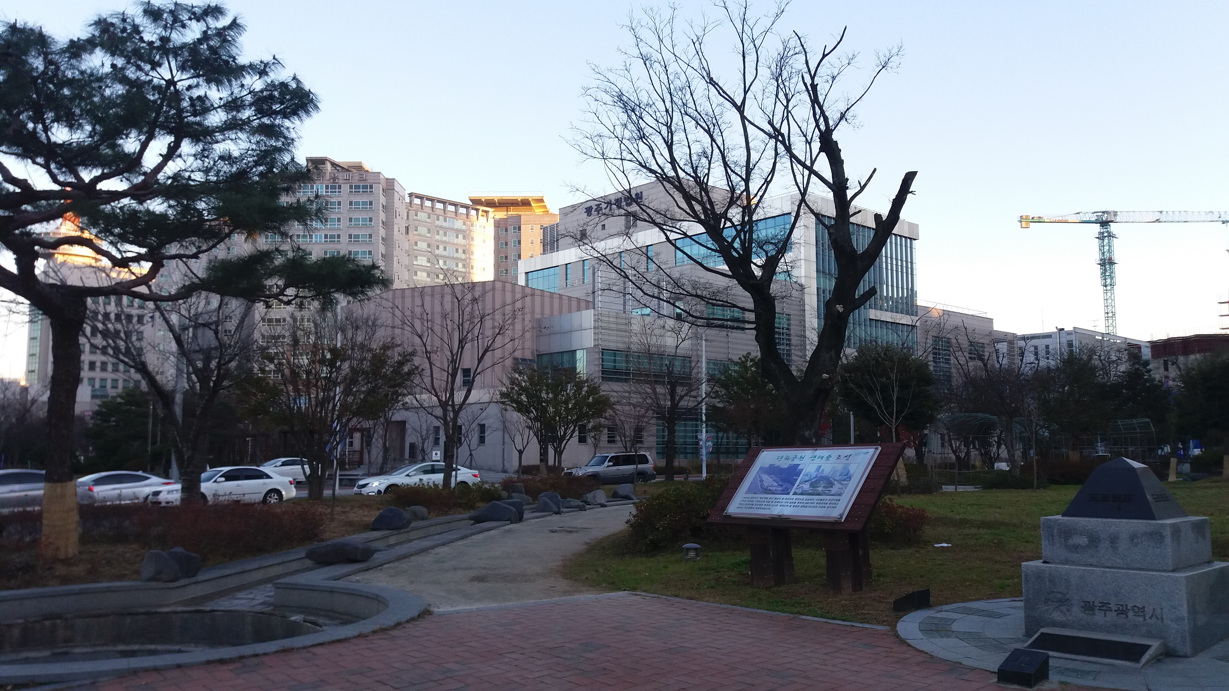 광주가정법원